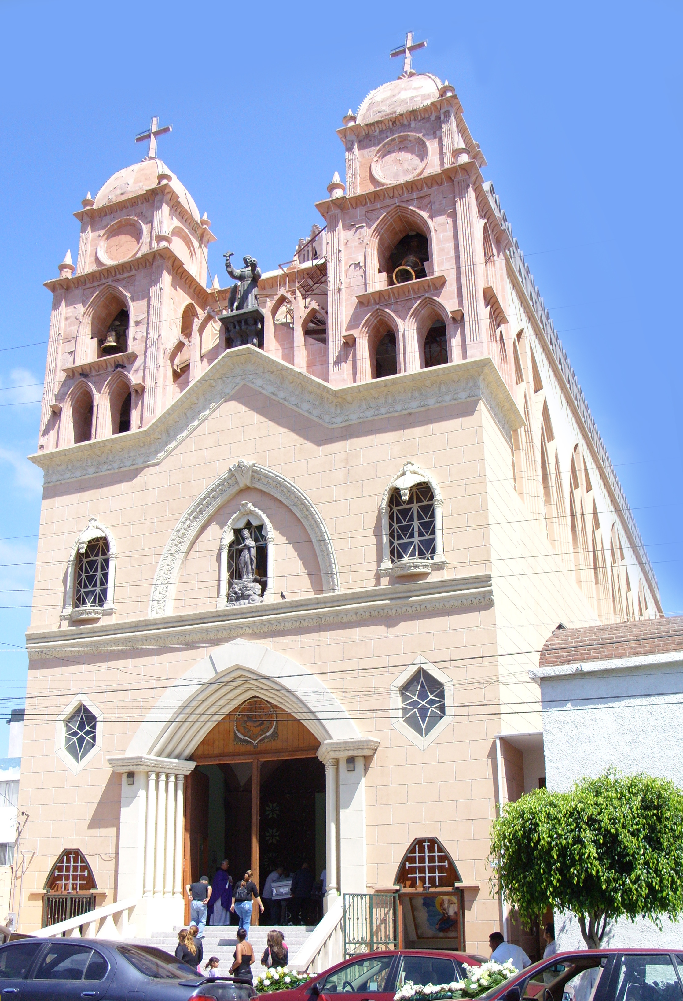 Iglesia calle 3a